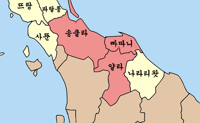 ko:2012년 태국 남부 폭탄 테러 지도